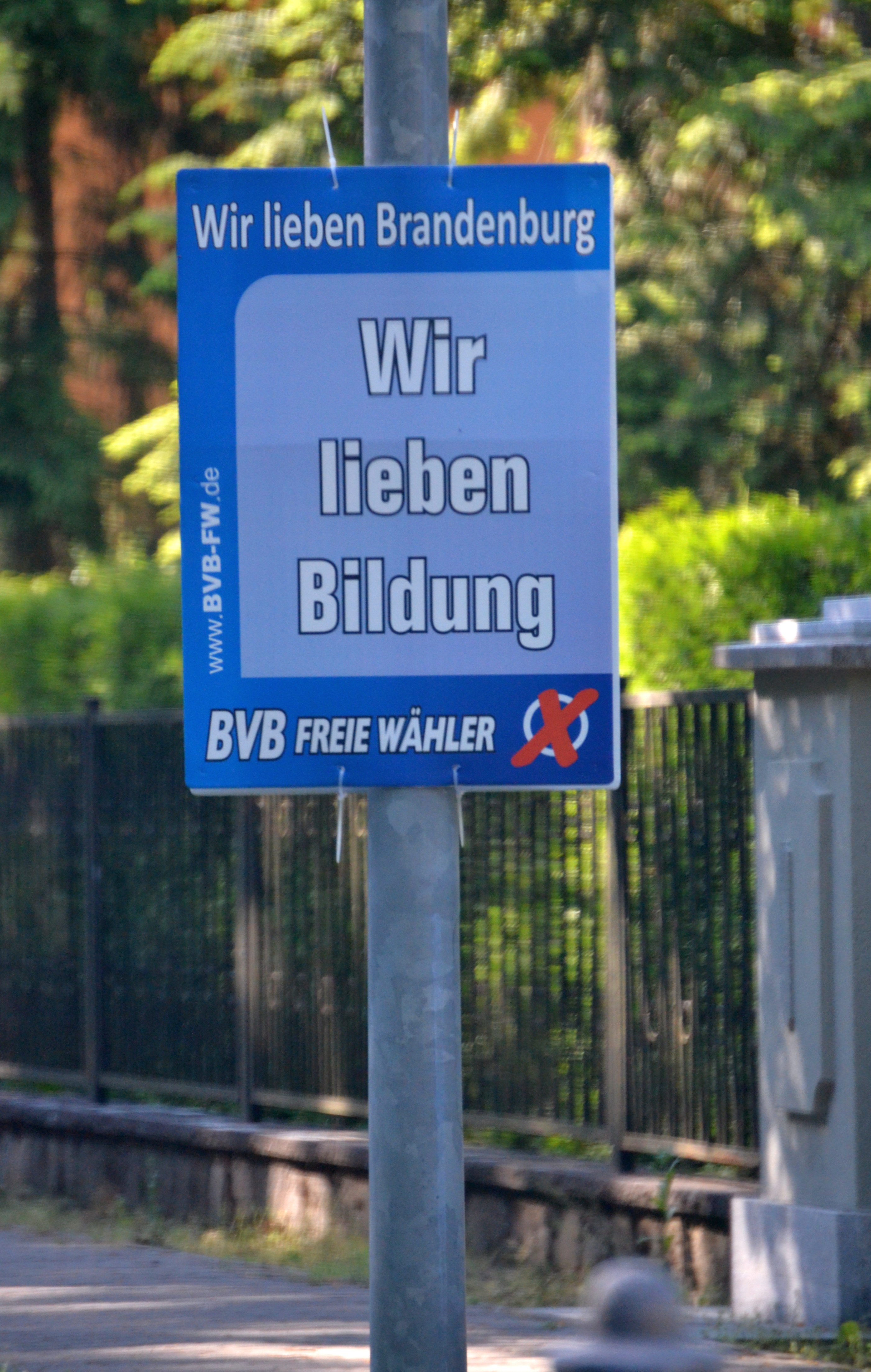 Wahlwerbung für die Kommunalwahlen in Brandenburg in Woltersdorf bei Berlin im Mai 2014.